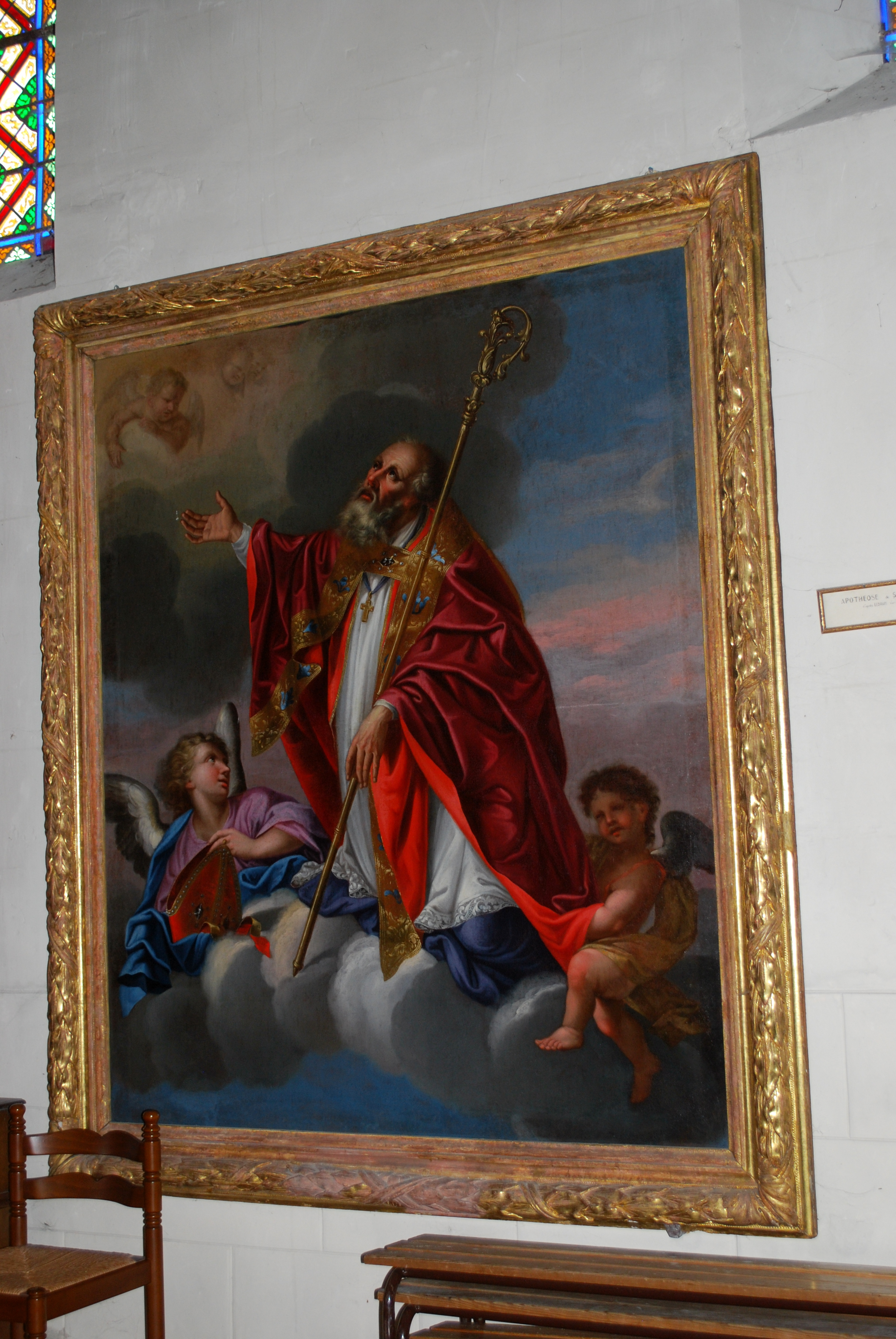 Saint-Morillon, église Saint-Maurille